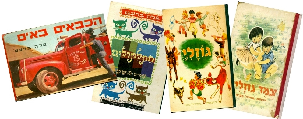 ספרי בלה ברעם